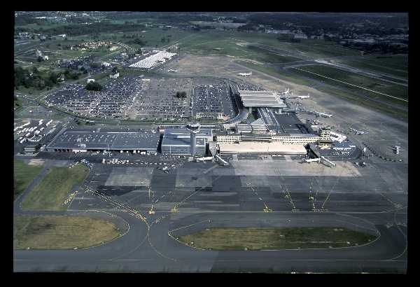 Vue generale de l aeroport Bordeaux Merignac